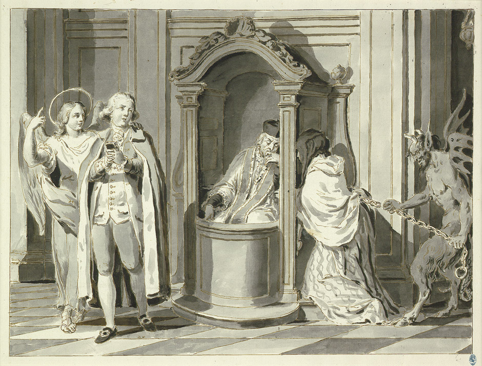 Beichte, aus einer Serie der sieben Sakramente: Federzeichnung, ca. 38,5 x 52,5 cm; hergestellt im Auftrag von Padre Ghedini